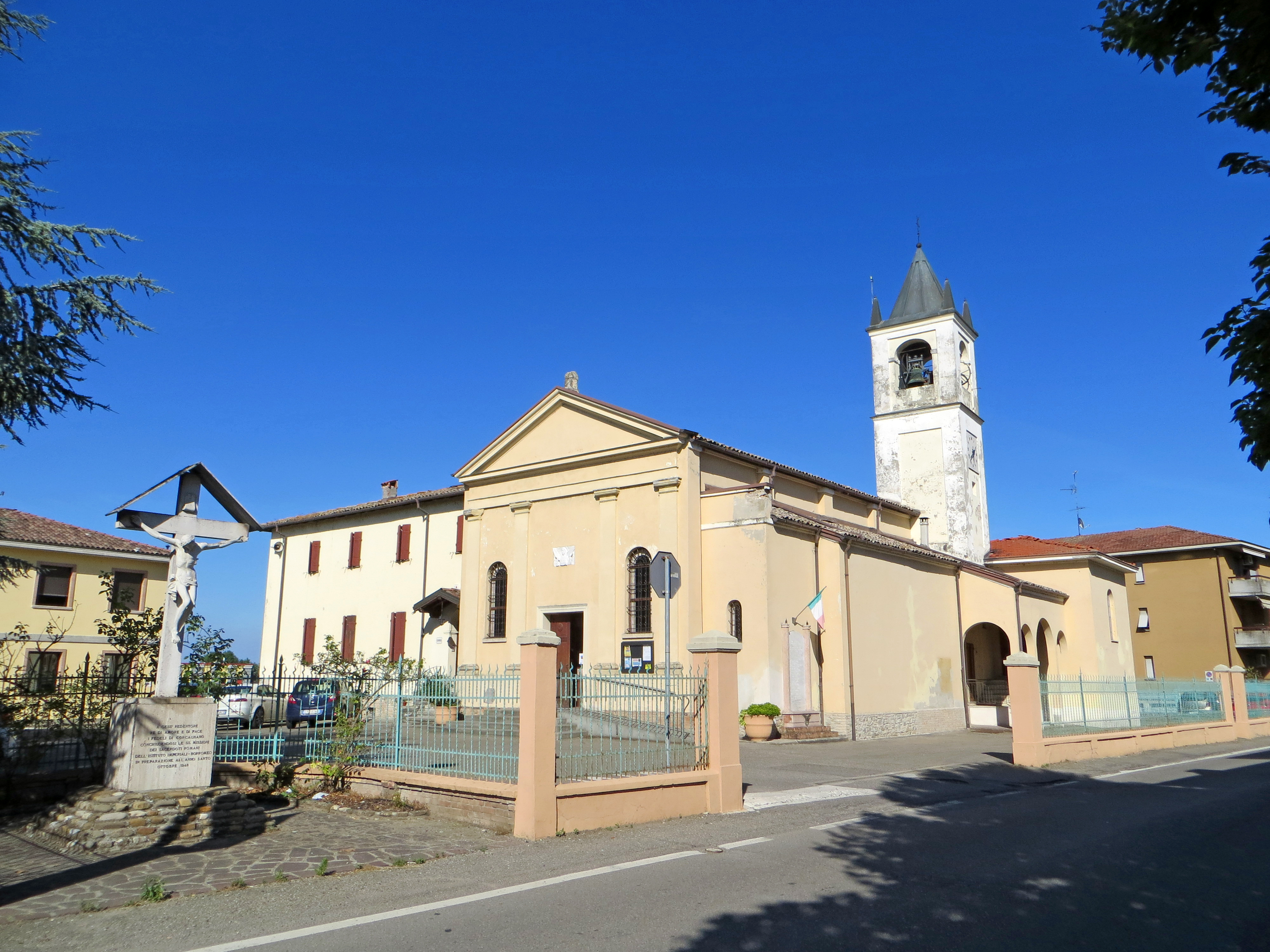 Chiesa di Santa Lucia (Corcagnano, Parma) - facciata e lato sud